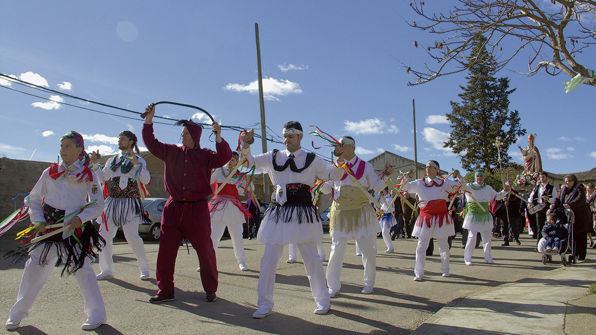 Danzantes y Birrios del pueblo de Villamandos de la Vega en la recuperación de esta tradición